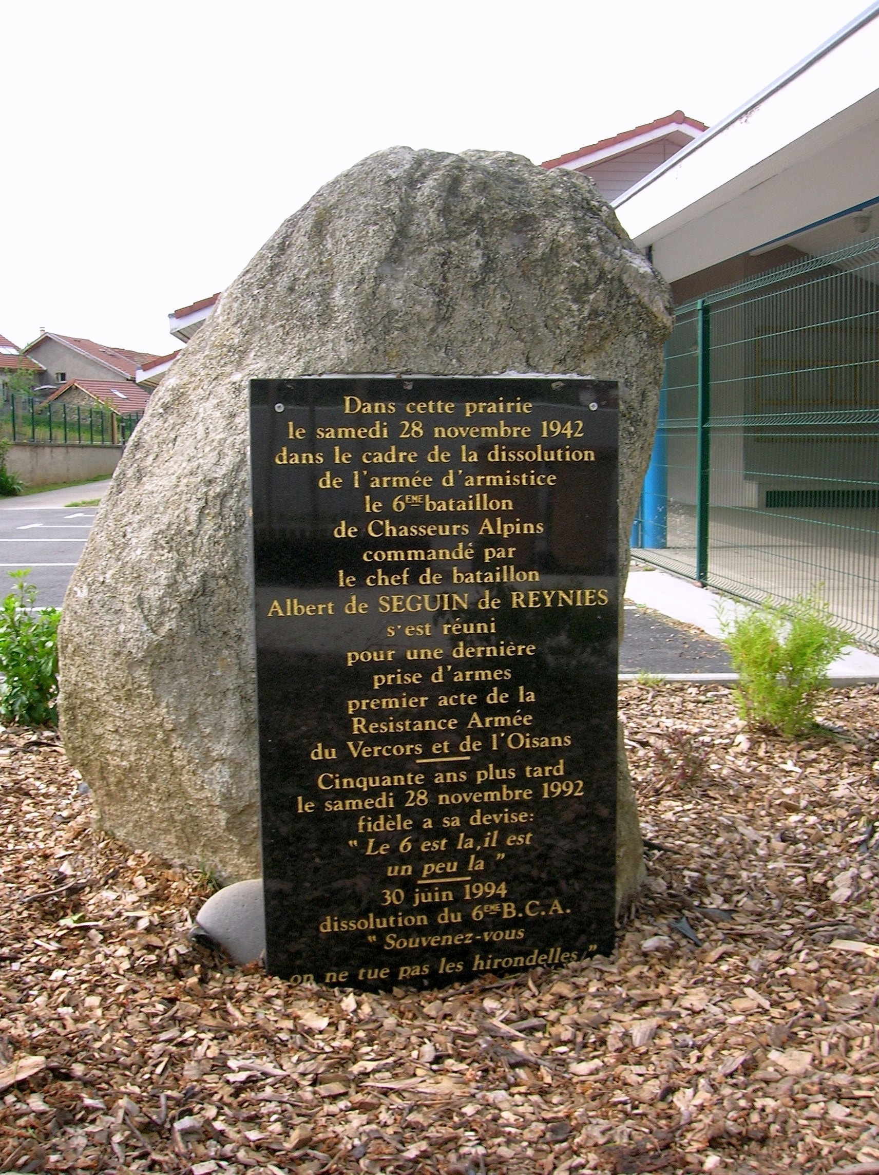 mémorial, à la hauteur de l'école du Barlatier, pour célébrer le 29 novembre 1942, quand l'armée nazie occupa la zone libre, le commandant Albert de Seguin de Reyniès dissout le 6e Bataillon de chasseurs alpins. Brié-et-Angonnes, Isère, France.